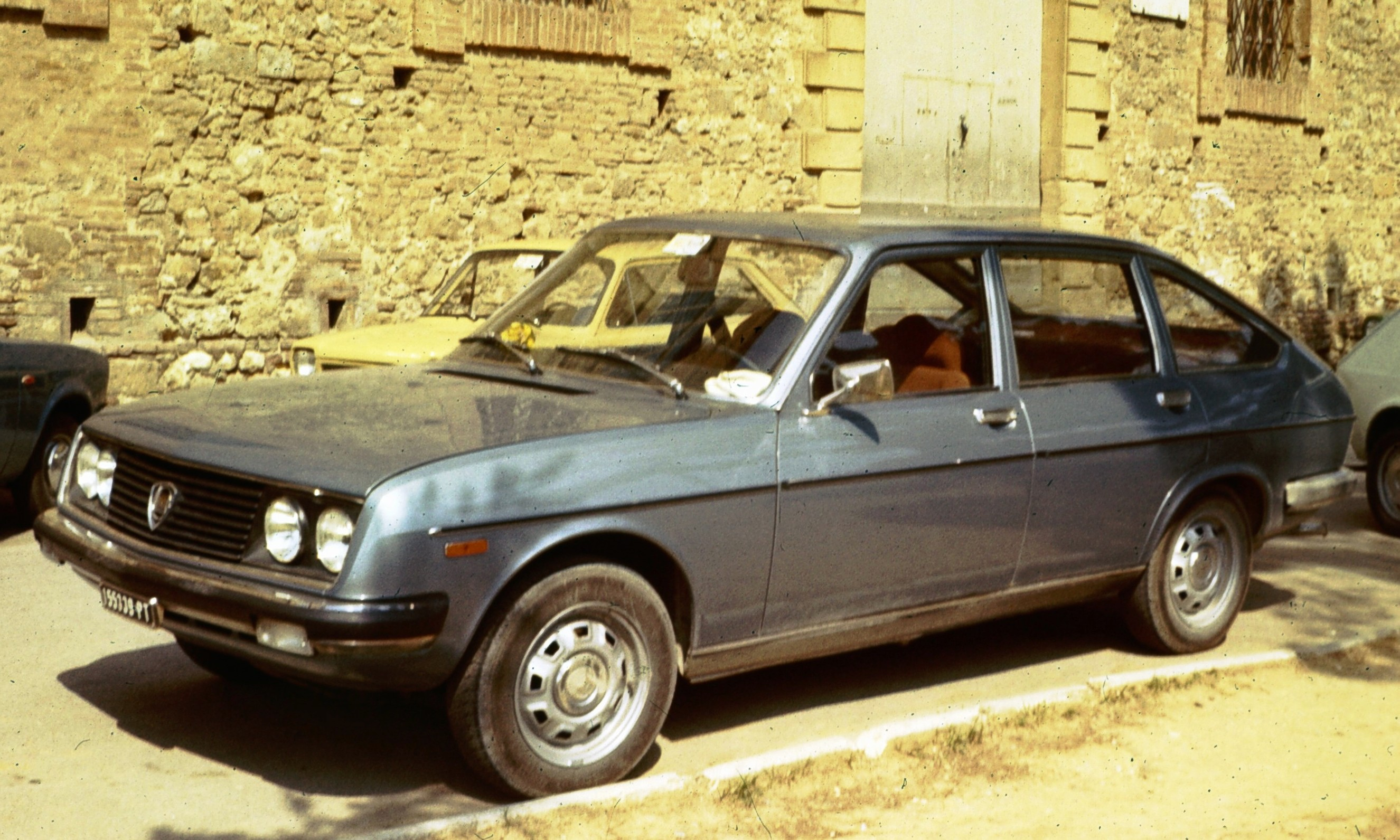 Lancia Beta Berlina (Pistoia)